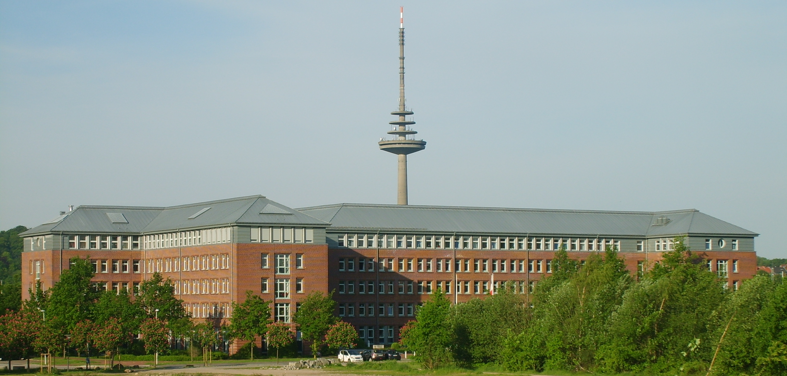 Ministerium für Soziales, Gesundheit, Familie und Gleichstellung Schleswig-Holstein